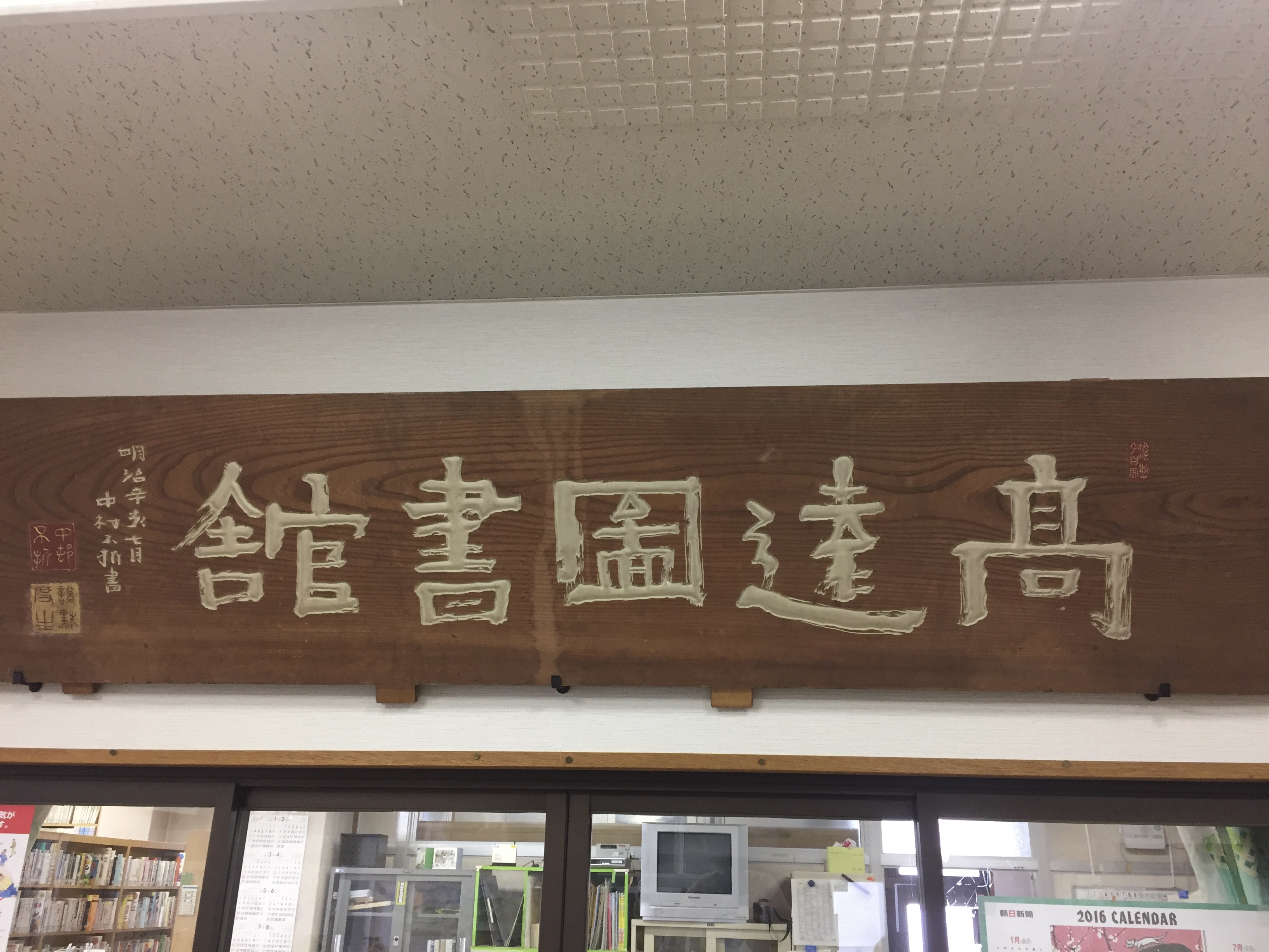 長野県伊那市の伊那市立高遠町図書館。書家の中村不折による「高遠図書館」の文字。